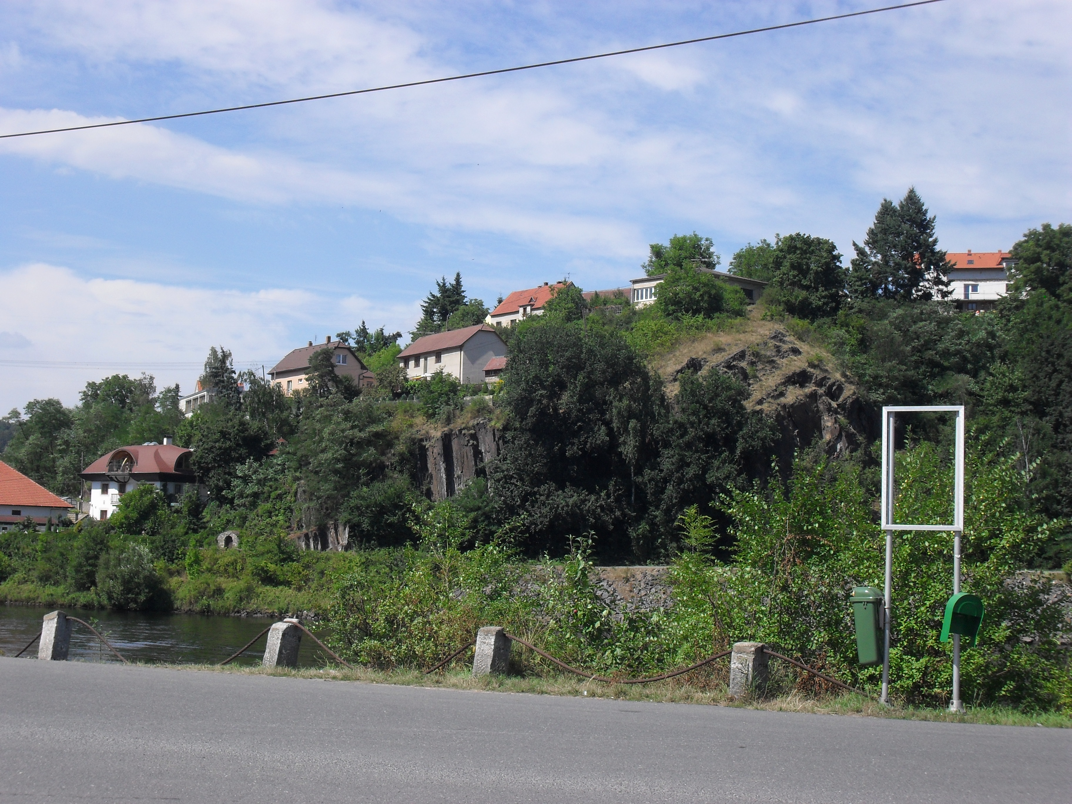 Hradištko-Brunšov v pohledu od Štěchovic.